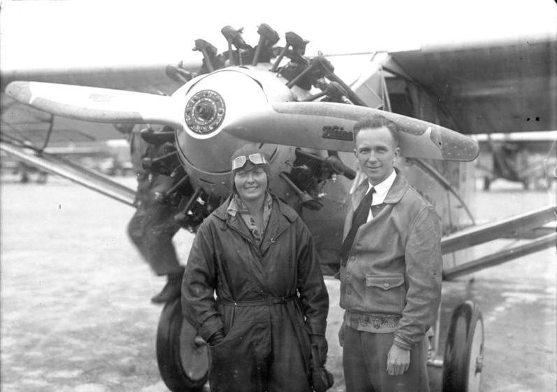 Thea Rasche, die bekannte deutsche Kunstpilotin ist für den ersten Ozeanflug einer Frau New York - Berlin startbereit! Frl. Thea Rasche, welche als erste Frau die Strecke New York - Berlin über den Ozean fliegen will.